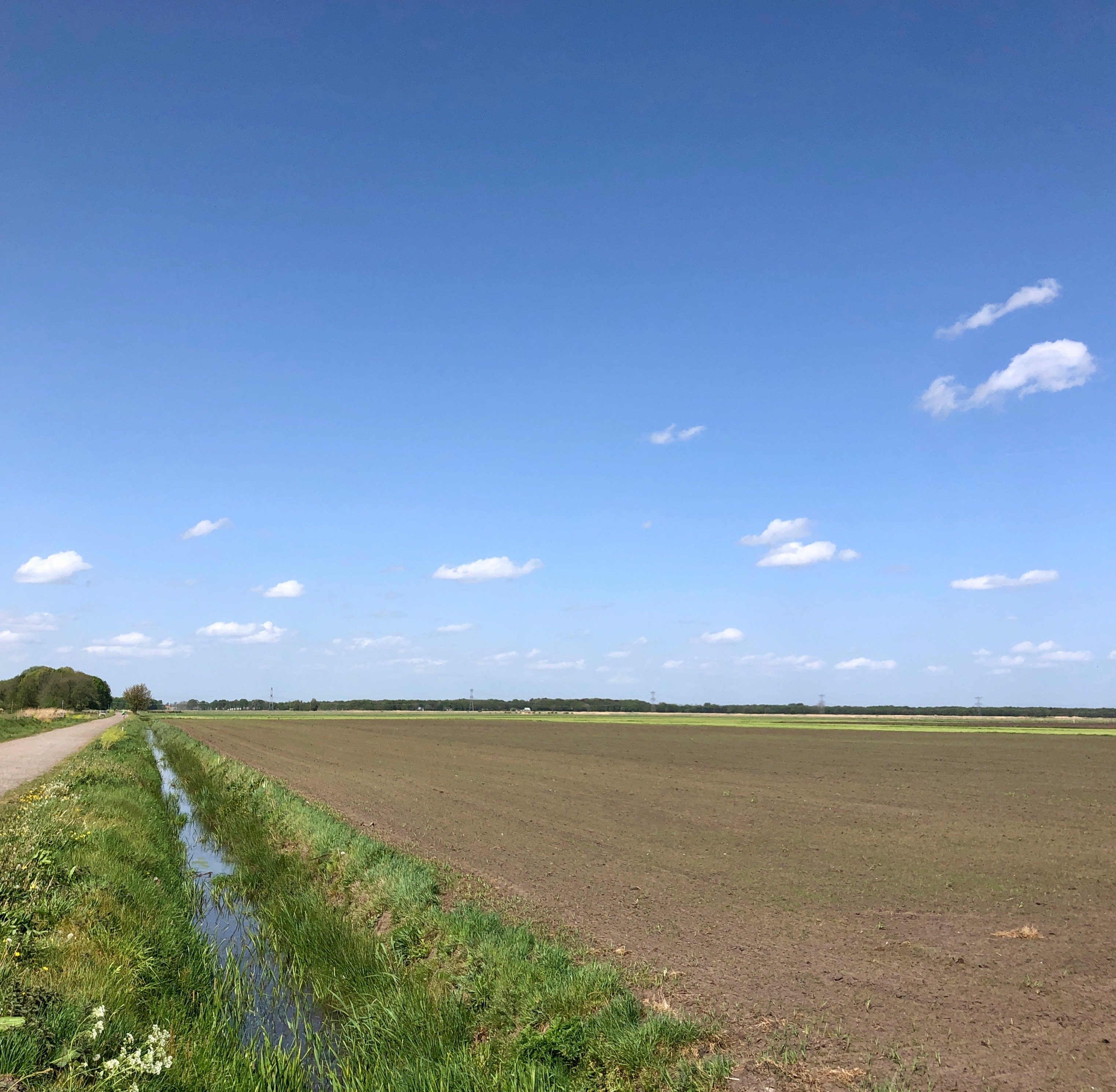 Zicht op een deel van het buitengebied 'Lage Vugt' gelegen naast de straat de Zwarte Dijk, Breda en niet ver van Teteringen